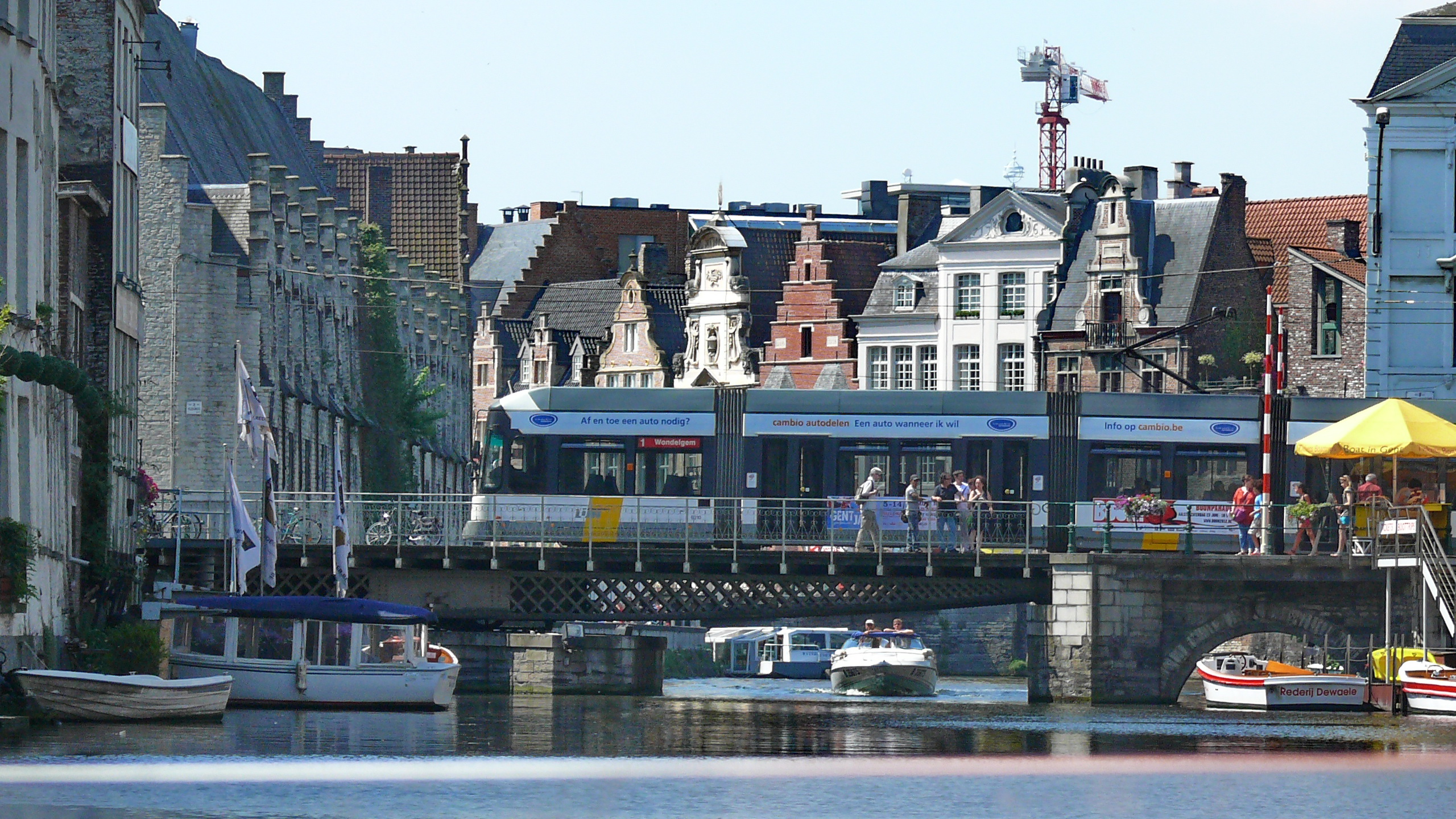 Tramway de Gand - Rame Hermelijn sur la ligne 1 franchissant le Vleesjuisbrug